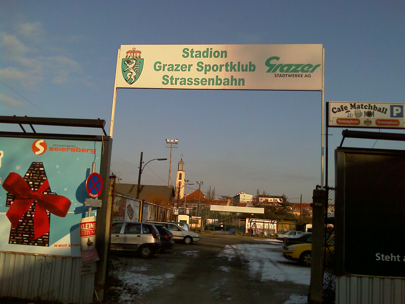 Eingagsportal der Gruabn